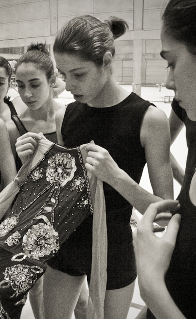 La gimnasta rítmica Marta Linares junto a otras componentes del conjunto nacional durante un entrenamiento en el CAR de Madrid en diciembre de 2003.